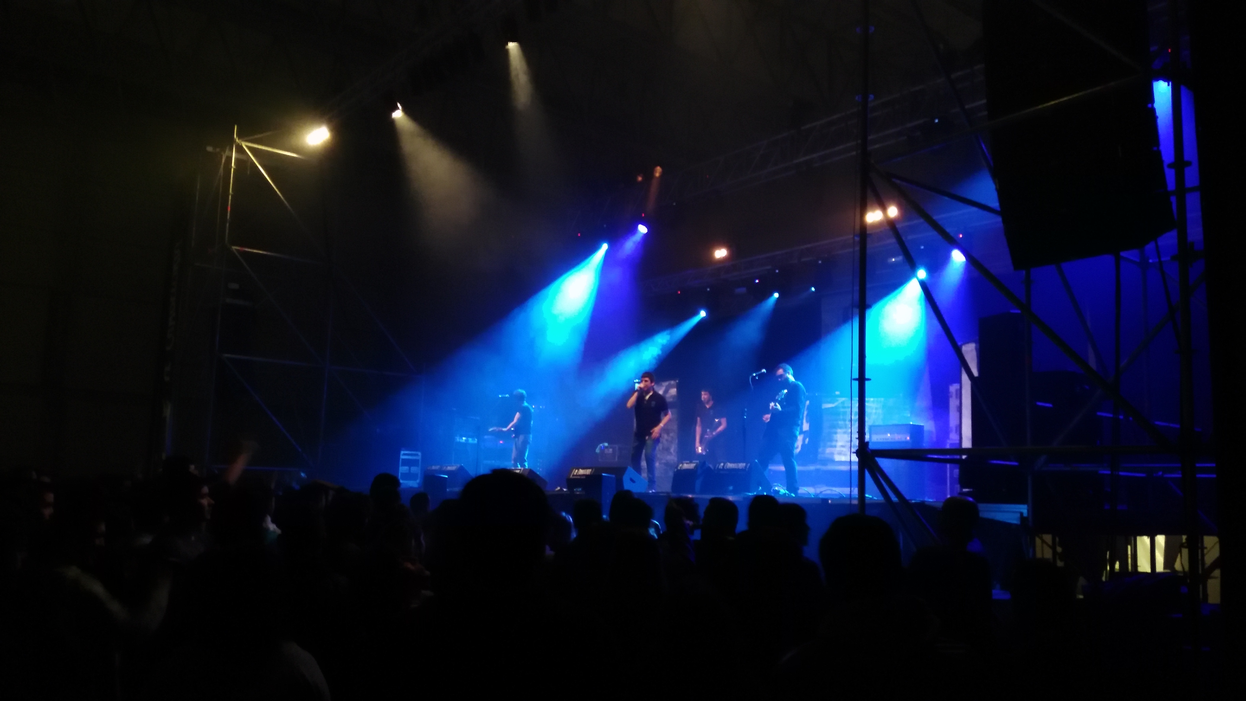 O grupo ZOO no Festival A Candeloria 2016 en Lugo